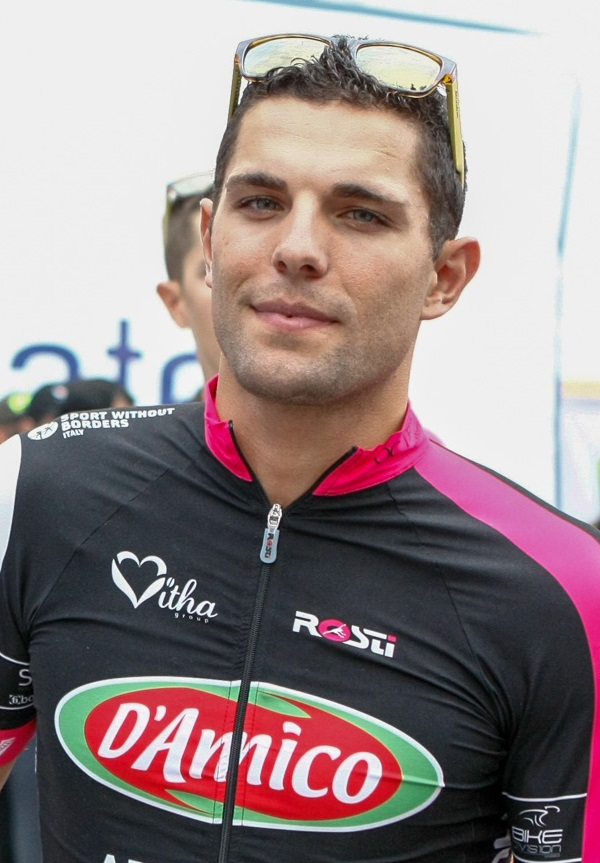 Andrea Pasqualon en la presentación de la Vuelta a Colombia 2014.